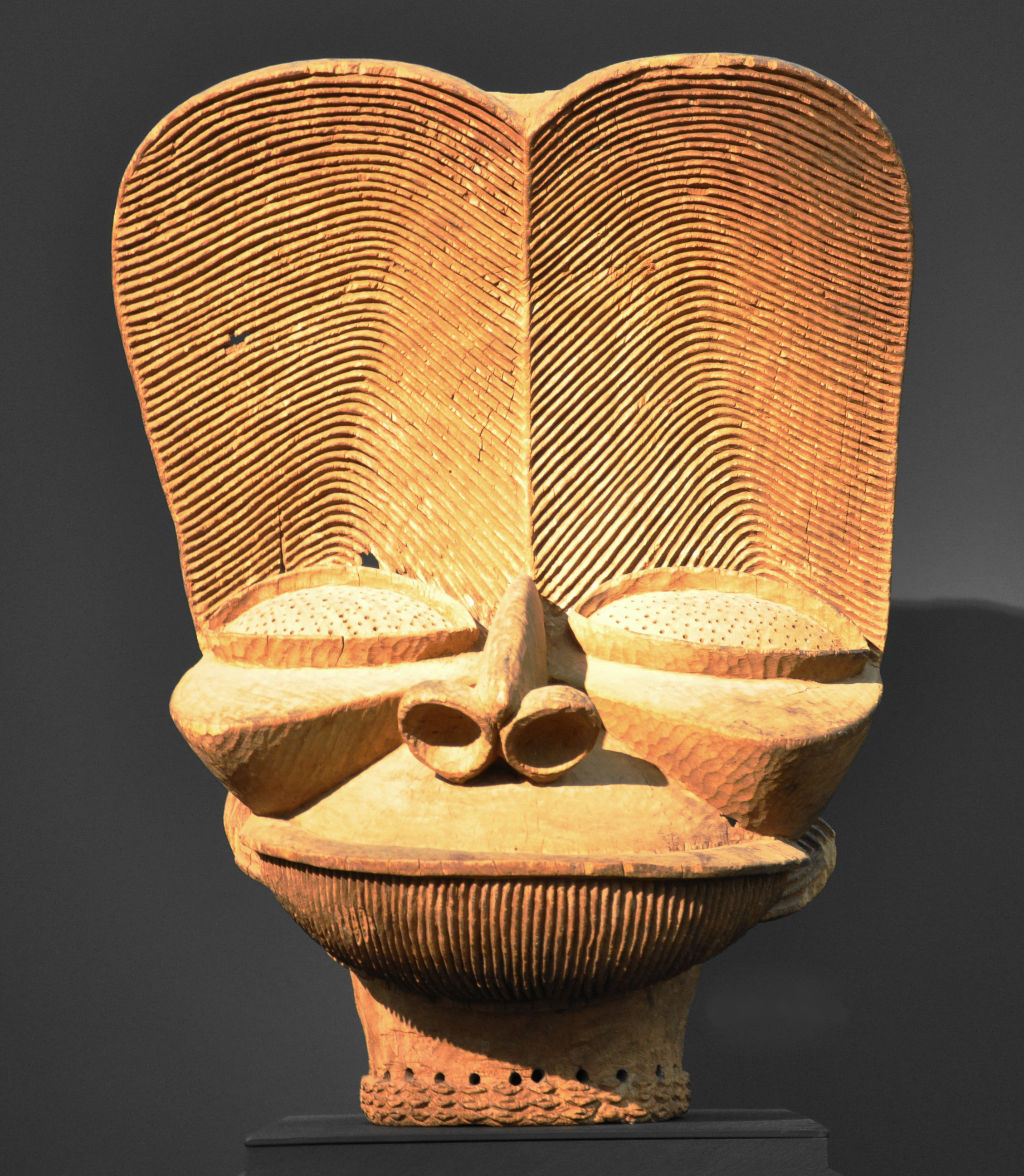 Königsmaske tukah, Bamileke-Meister von Bamendjo, Kamerun, Batcham-Region, 19. Jahrhundert; Holz Museum Rietberg, Zürich; Geschenk Eduard von der Heydt; Inv. Nr. RAF 721